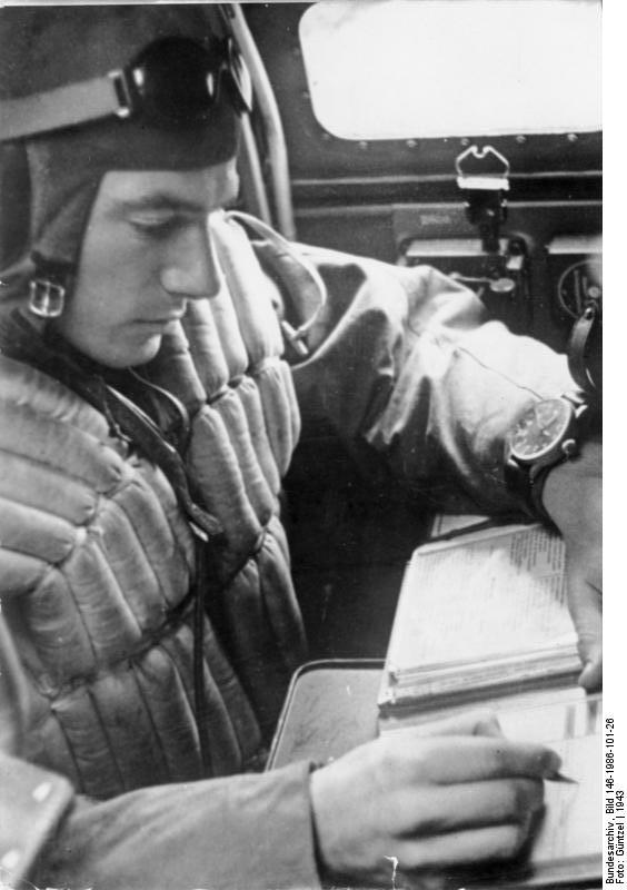 Auf die Sekunde. Die Borduhr im Flugzeug. Nach der Uhr trägt der Bordfunker die genauen Meldezeiten in seine Funksprüche ein. Diese Zeiteintragungen sind oft entscheidend für die Zuerkennung eines versenkten Frachters oder eines Abschusses.